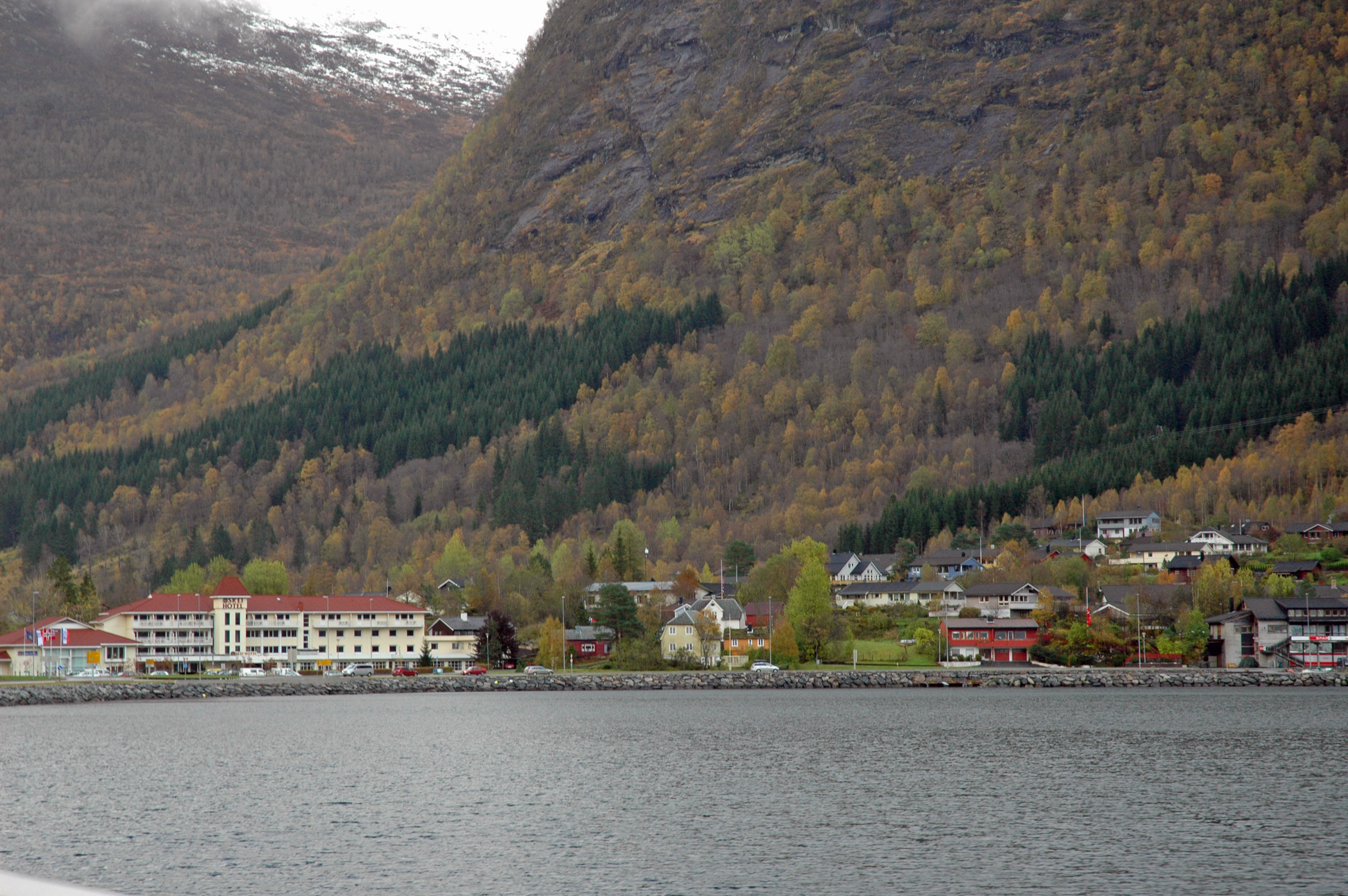 Skei i Jølster